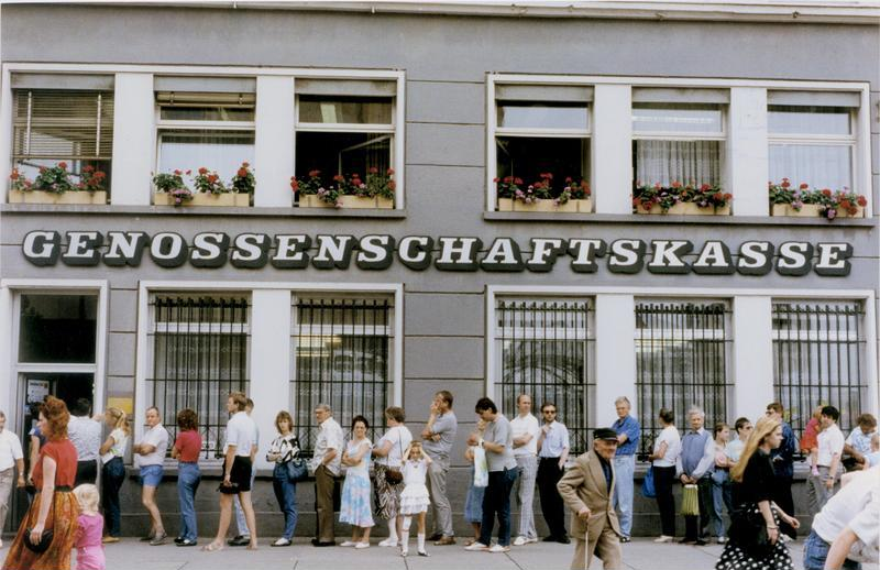 ADN-ZB/Kasper/6.7.90/ Gera: Währungsumstellung/ Vor der Genossenschaftskasse in Gera fanden sich am 1. Juli viele Bürger ein, um sich einen Vorabbetrag in DM von ihrem Konto zu holen. Information added by Wikimedia users.